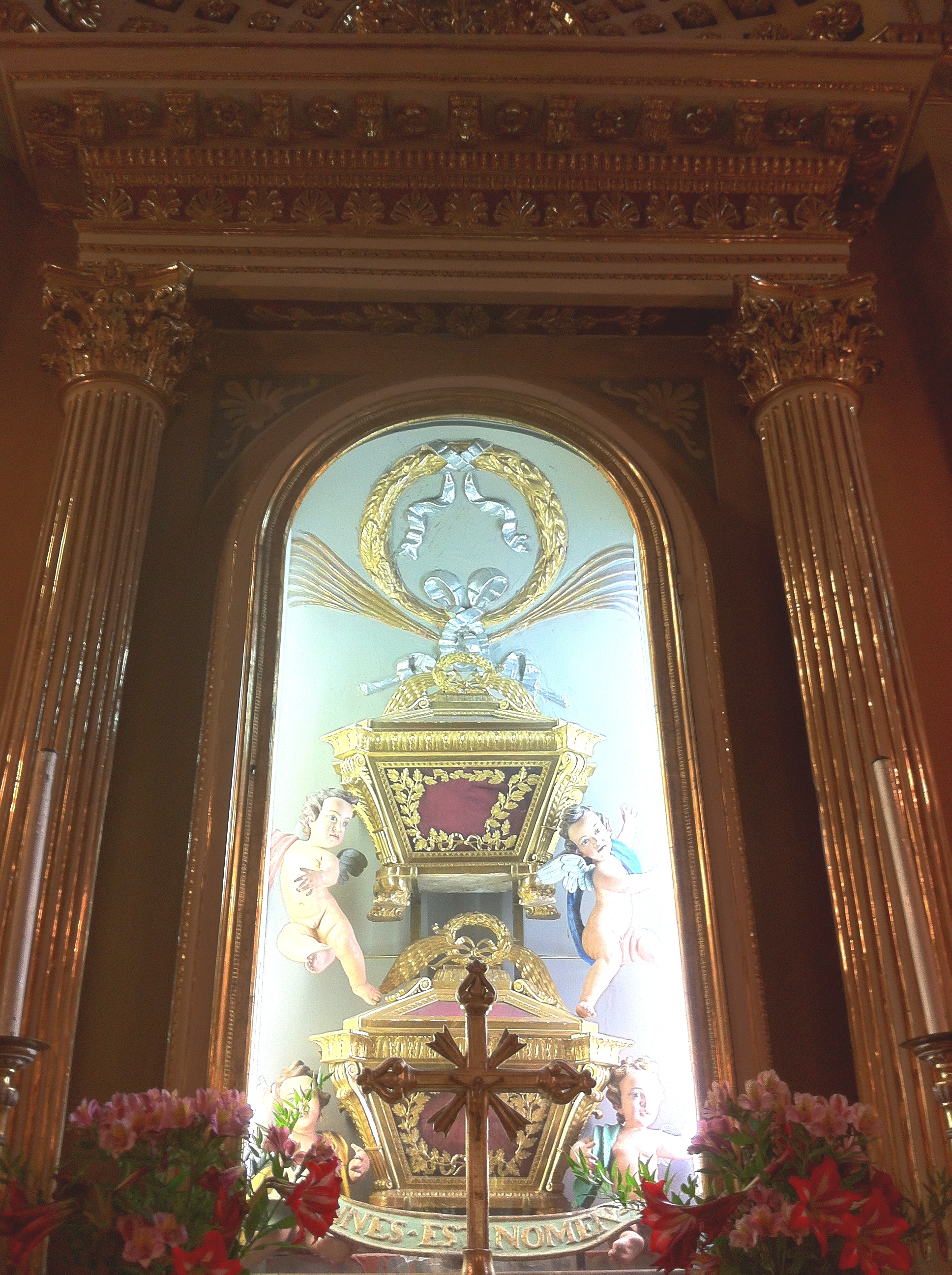 Oratorio di San Giovanni Battista in Loano -SV- (Italy) reliquiario di San Giovanni Battista